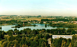 Donkvijver in Bevere, een deelgemeente van de Belgische stad Oudenaarde. Eigen foto.